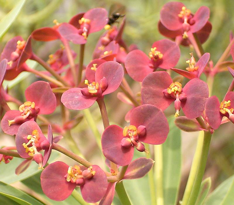 Euphorbia atropurpurea var. atropurpurea, BG Bochum, Germany